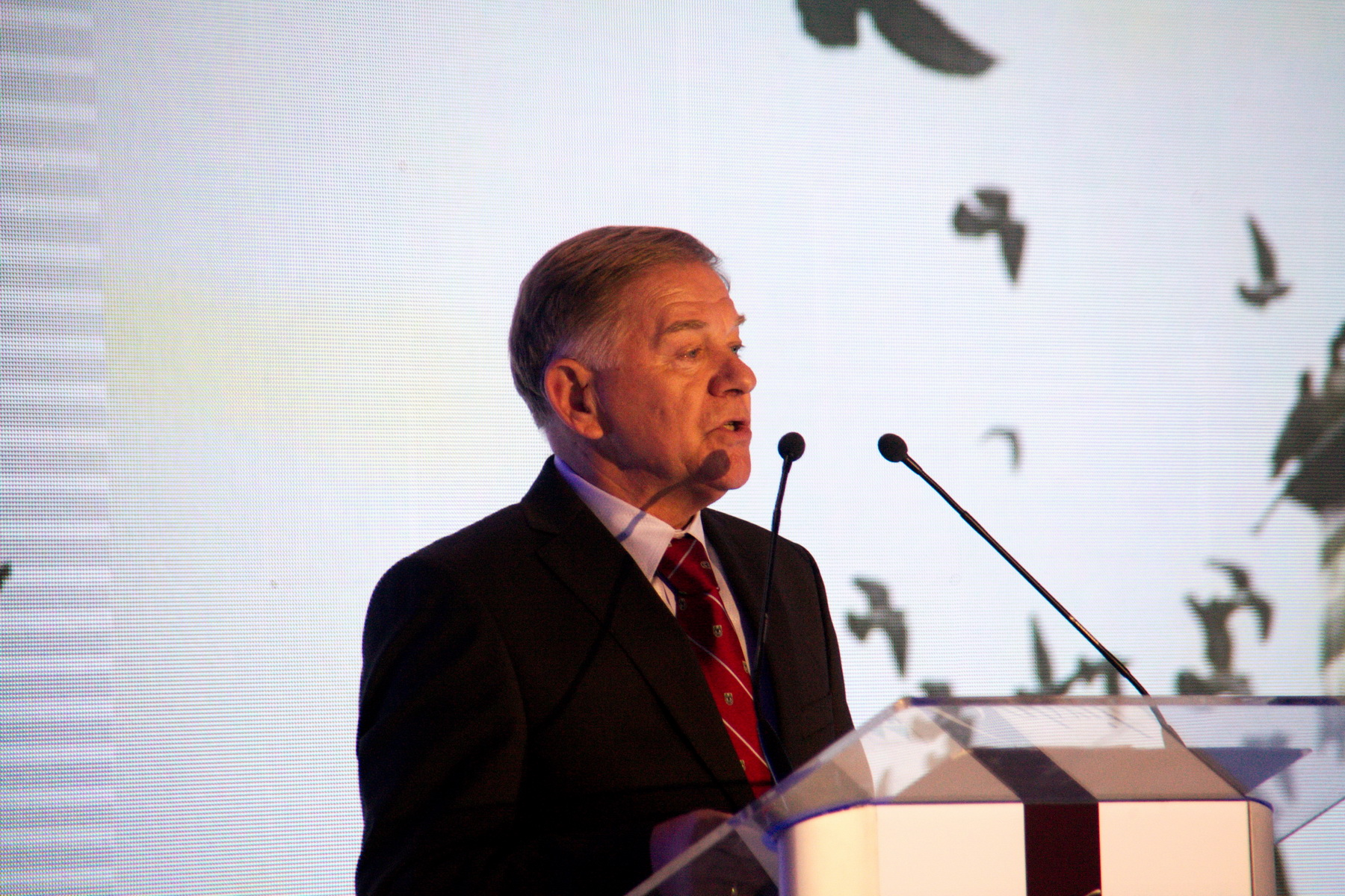 Ivo Komsic, alcalde de Sarajevo, durant l'acte de reconeixement dels Ciutadans d'Honor de Sarajevo del 2015, celebrat el 6 abril 2015